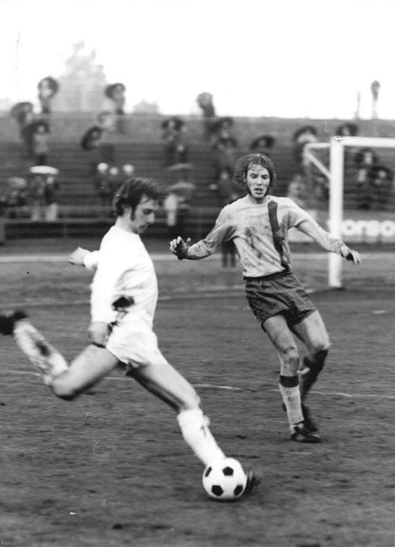 ADN-ZB-Lehmann-19.10.74-pe-Berlin: Fußball-Oberliga - Der BFC Dynamo Berlin gewann am 19.10.74 bei einem Heimspiel gegen den 1. FC Lok Leipzig 3:1. Unser Foto zeigt den BFC-Spieler Terletzki (links) im Angriff gegen den Leipziger Sekora.